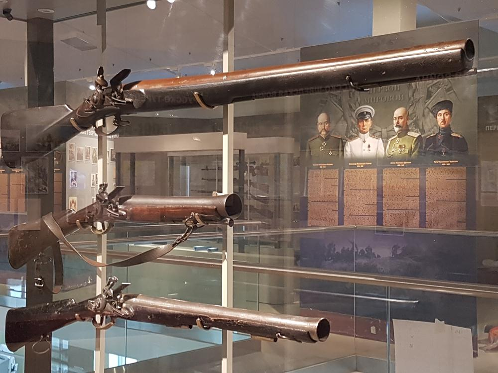 Огнестрельное оружие в коллекции Музея отечественной военной истории